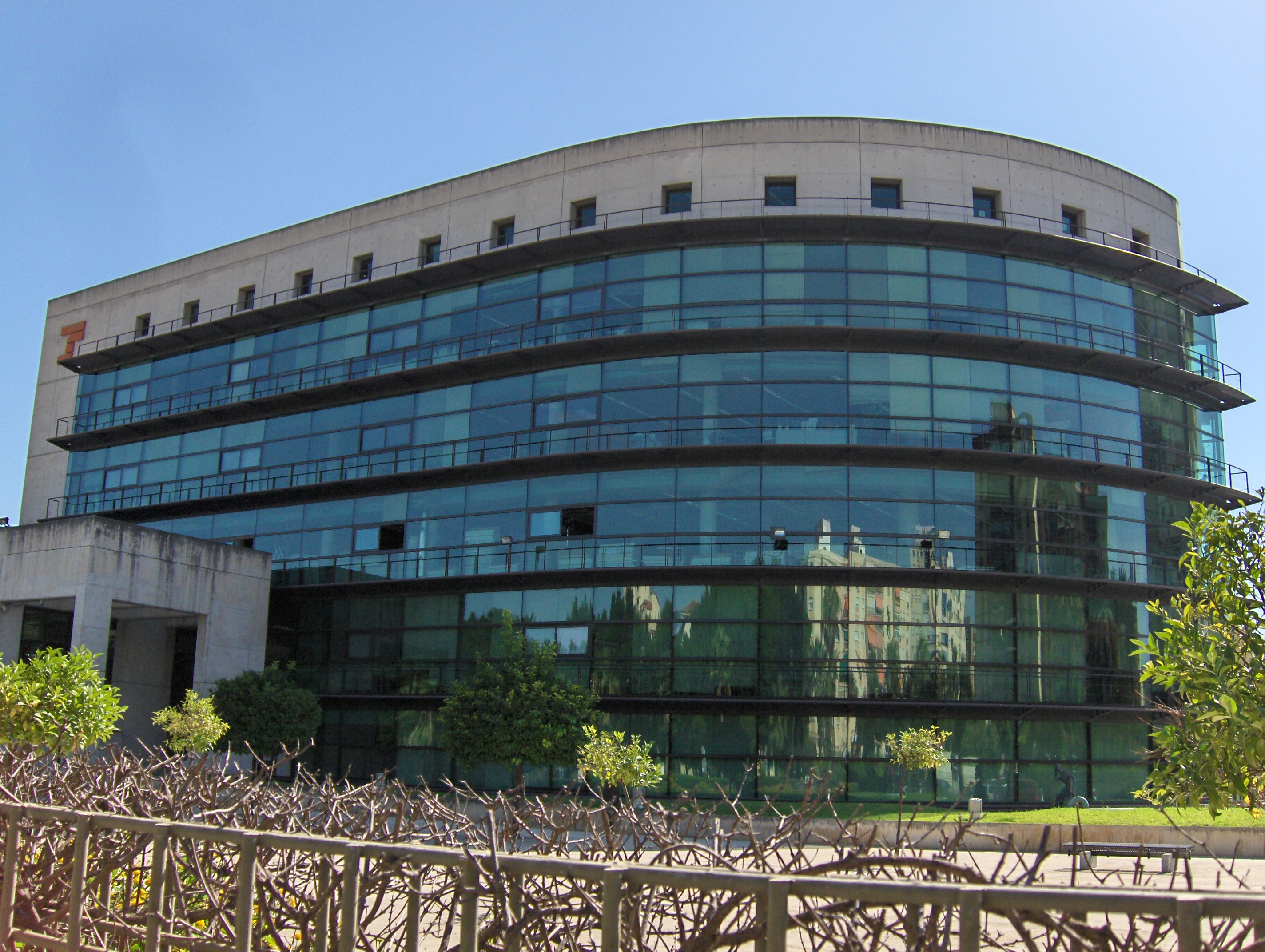 Sede de la Dirección Provincial y Tesorería General de la Seguridad Social en Málaga.